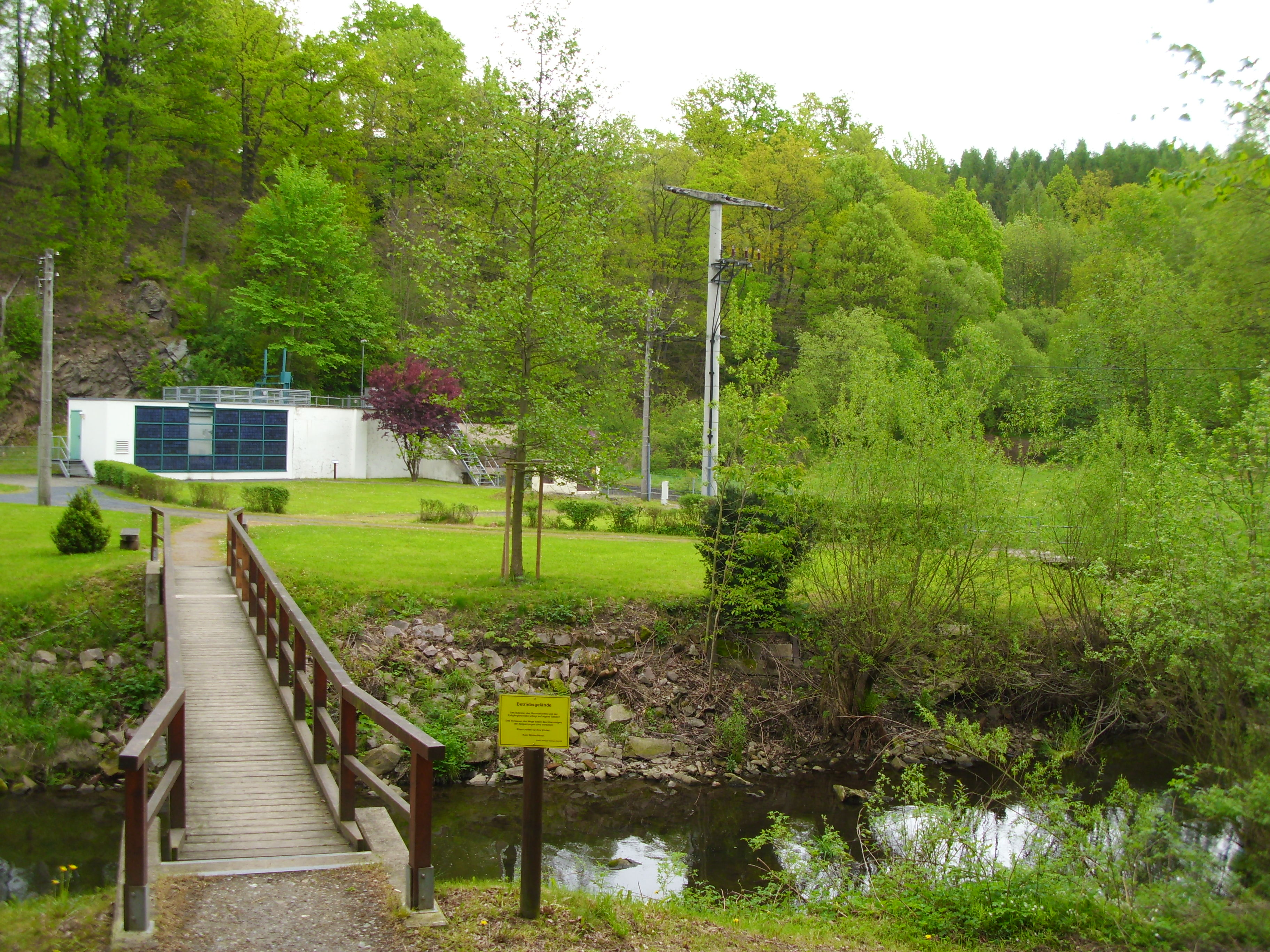 Das erste Wasserkraftwerk entstand 1892 unter dem in Meran lebenden Besitzer Ingeniuer Friedrich Theodor Hassler, welcher es aus der 1880 erbauten Oelmühle baute. 1911 ging es an das Öffentliche Stromnetz, nachdem es zuvor überwiegend Seifersdorf mit Strom versorgte. Im Jahre 2005 wurde das heutige neue Wasserkraftwerk mit Solarenergieerzeugung eingeweiht, nach dem Abriss des älteren.